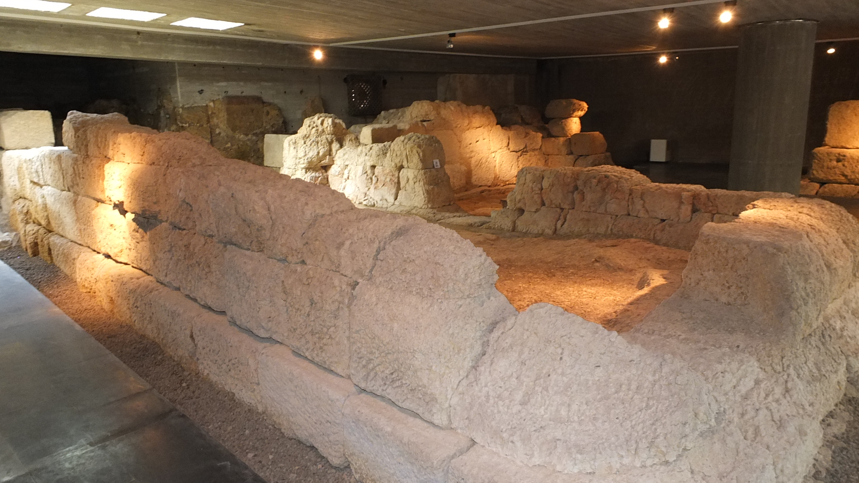 Restos de la puerta este del capamento de la Legio VII